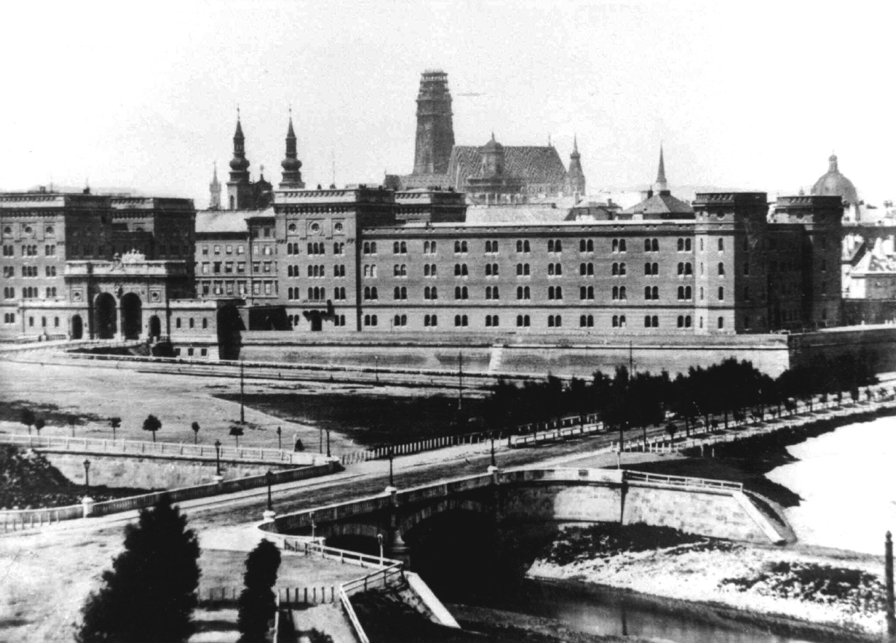 Wien 1861, Blick über die Radetzkybrücke des Wienflusses auf die Franz-Joseph-Kaserne, im Hintergrund der Stephansdom mit abgetragener Spitze des Südturms; die 1858 begonnene Demolierung der Stadtmauer war in diesem Abschnitt noch nicht vollendet